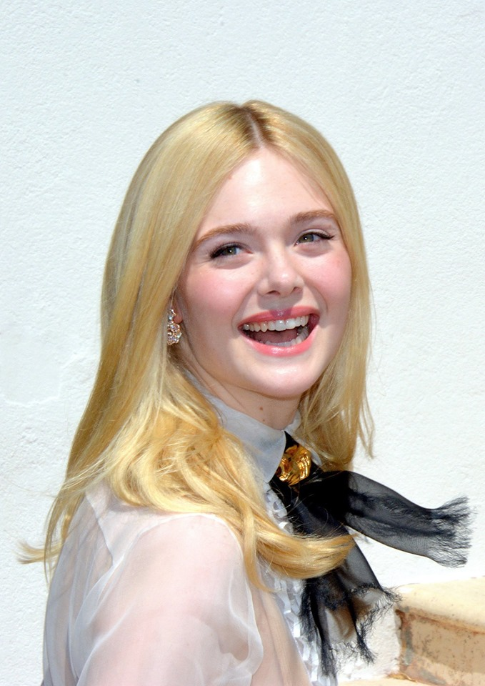 Elle Fanning au Festival de Cannes 2019.